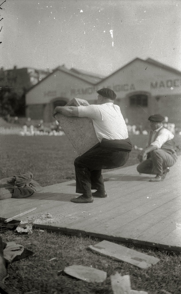 Título original: Levantador de piedra en el campo de fútbol de Atotxa (1/1) Localización: San Sebastián (Guipúzcoa)